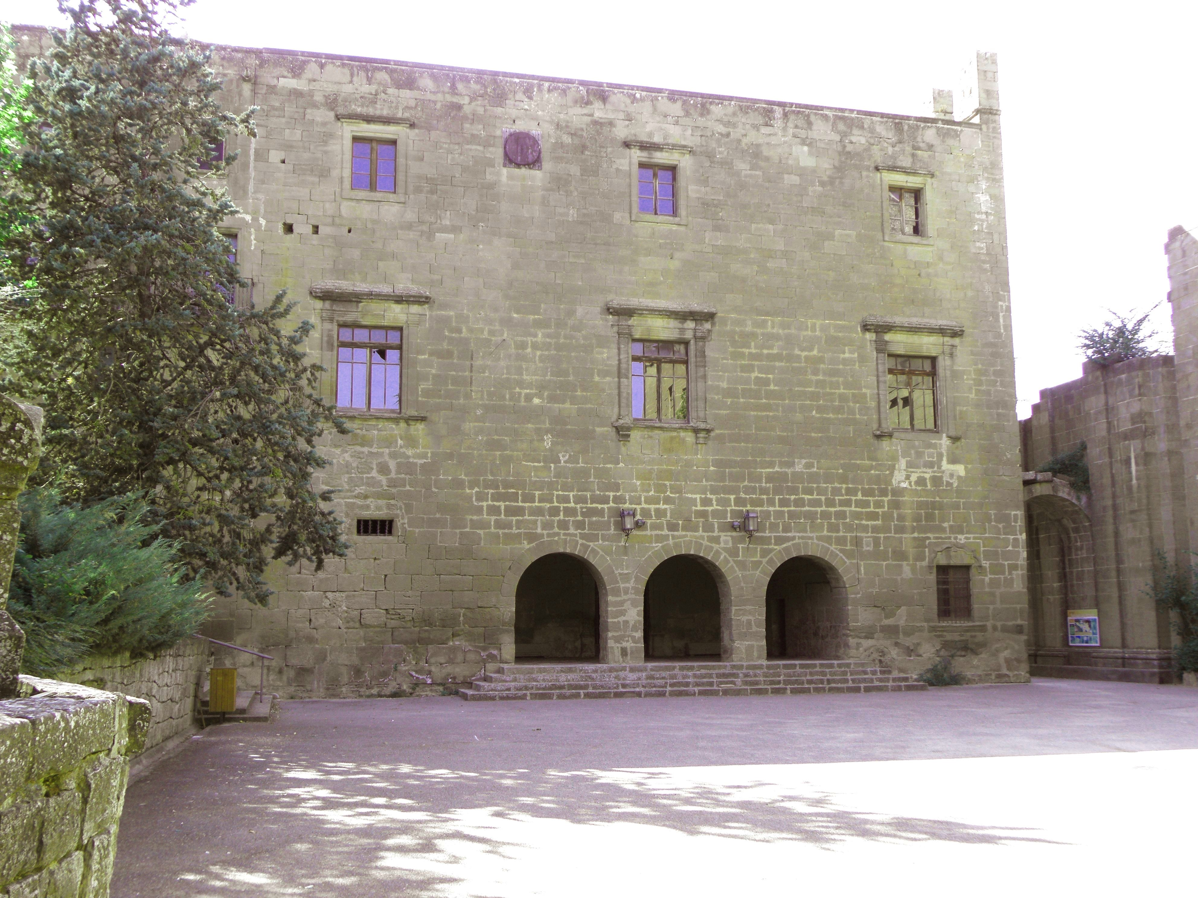 La façana est de la Casa Gran (Riner, Solsonès) que tanca la plaça del Miracle per la banda de ponent.